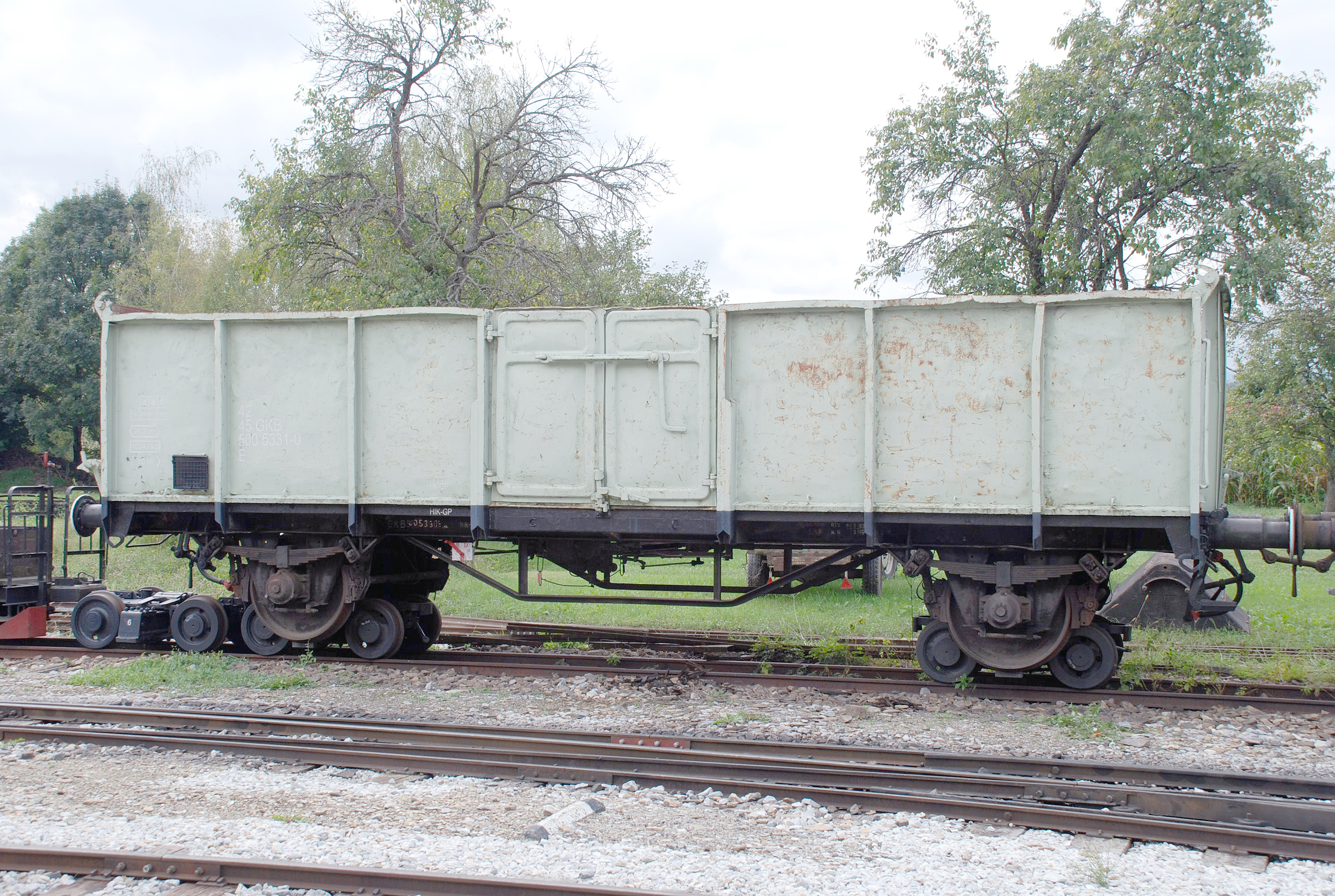 Bahnhof Stainz der Lokalbahn Preding-Wieselsdorf - Stainz (Stainzer Lokalbahn, Flascherlzug): der im September 2011 dort aufgeschemelte offenen Normalspurgüterwagen der Regelbauart E der Graz-Köflacher-Bahn aus der Zeit ab 1960